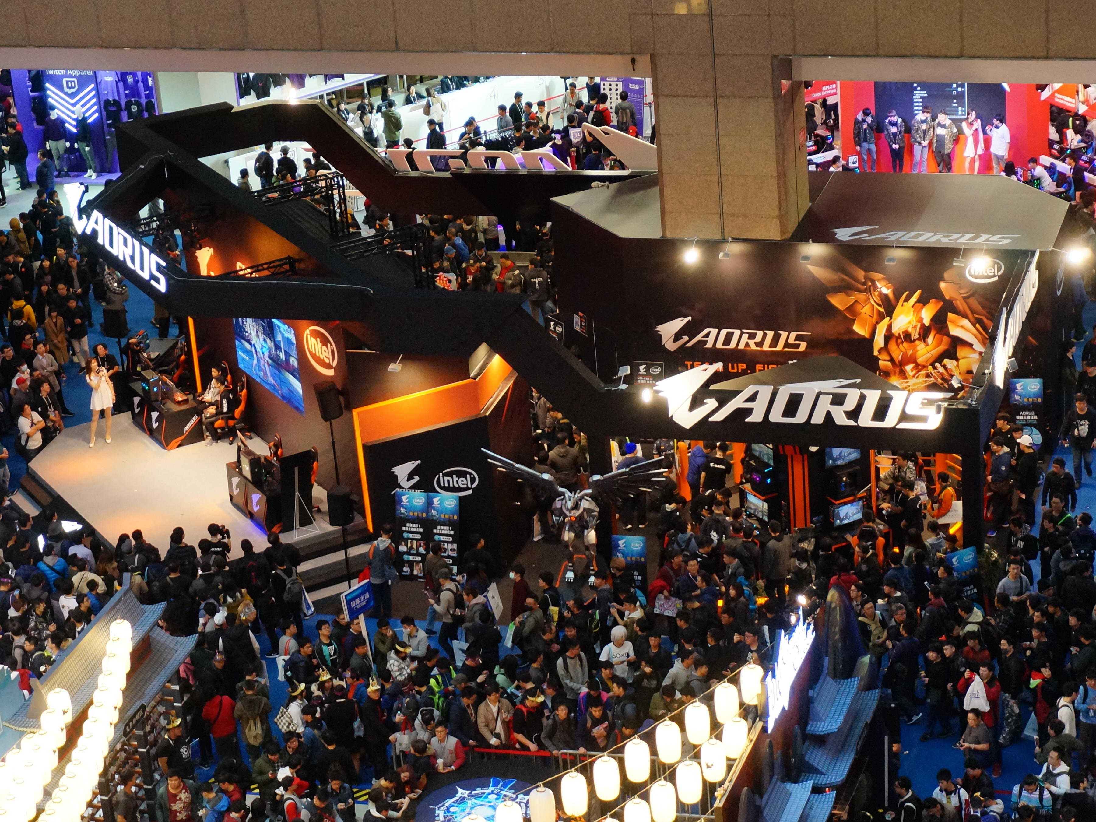 中文（台灣）: 2019台北國際電玩展世貿一館展區，技嘉科技電競品牌Aorus攤位。